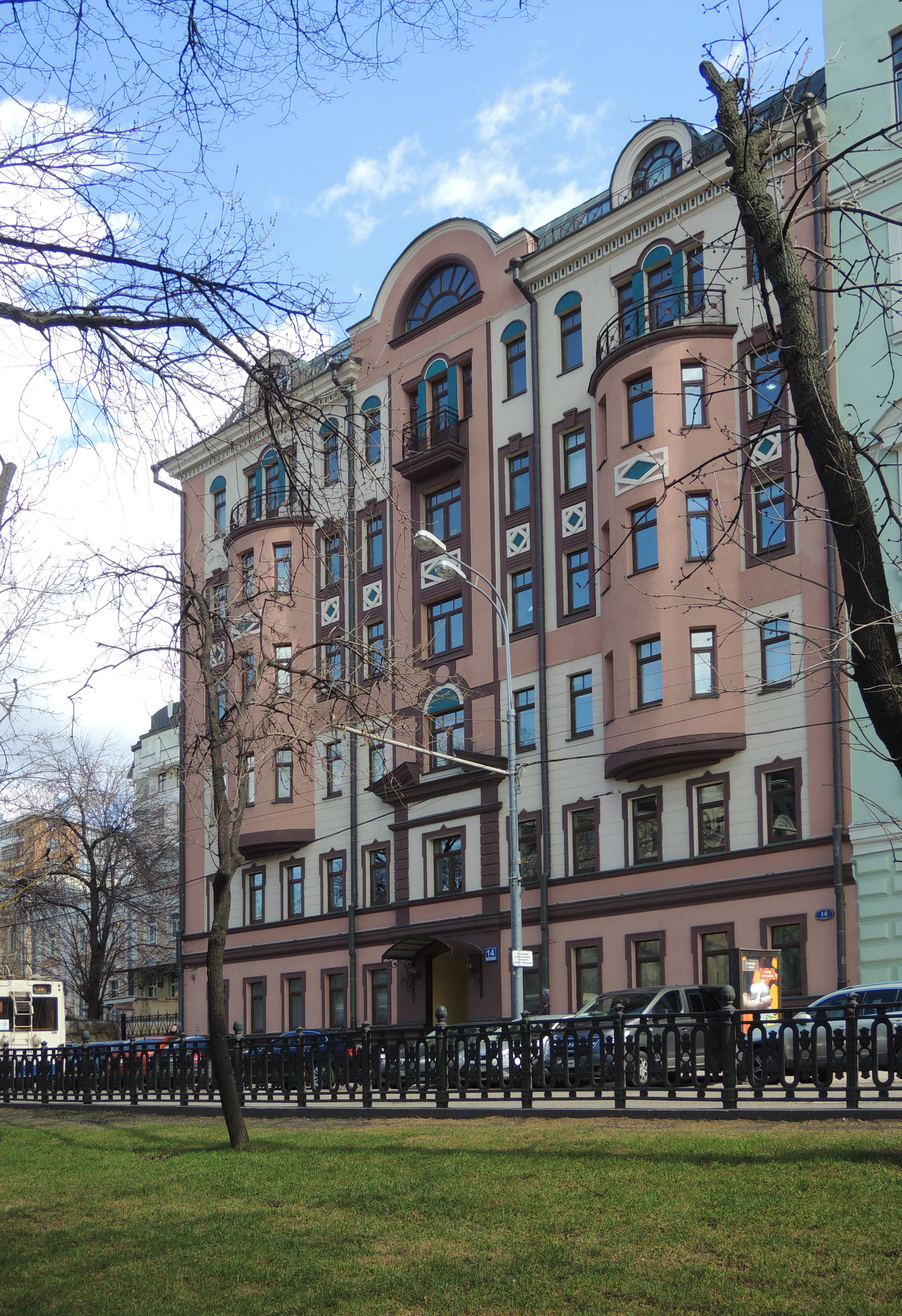 Тверской бульвар. № 14, стр. 1 — Административное здание ТАСС (1997—1998, архитектор Д. М. Деев)